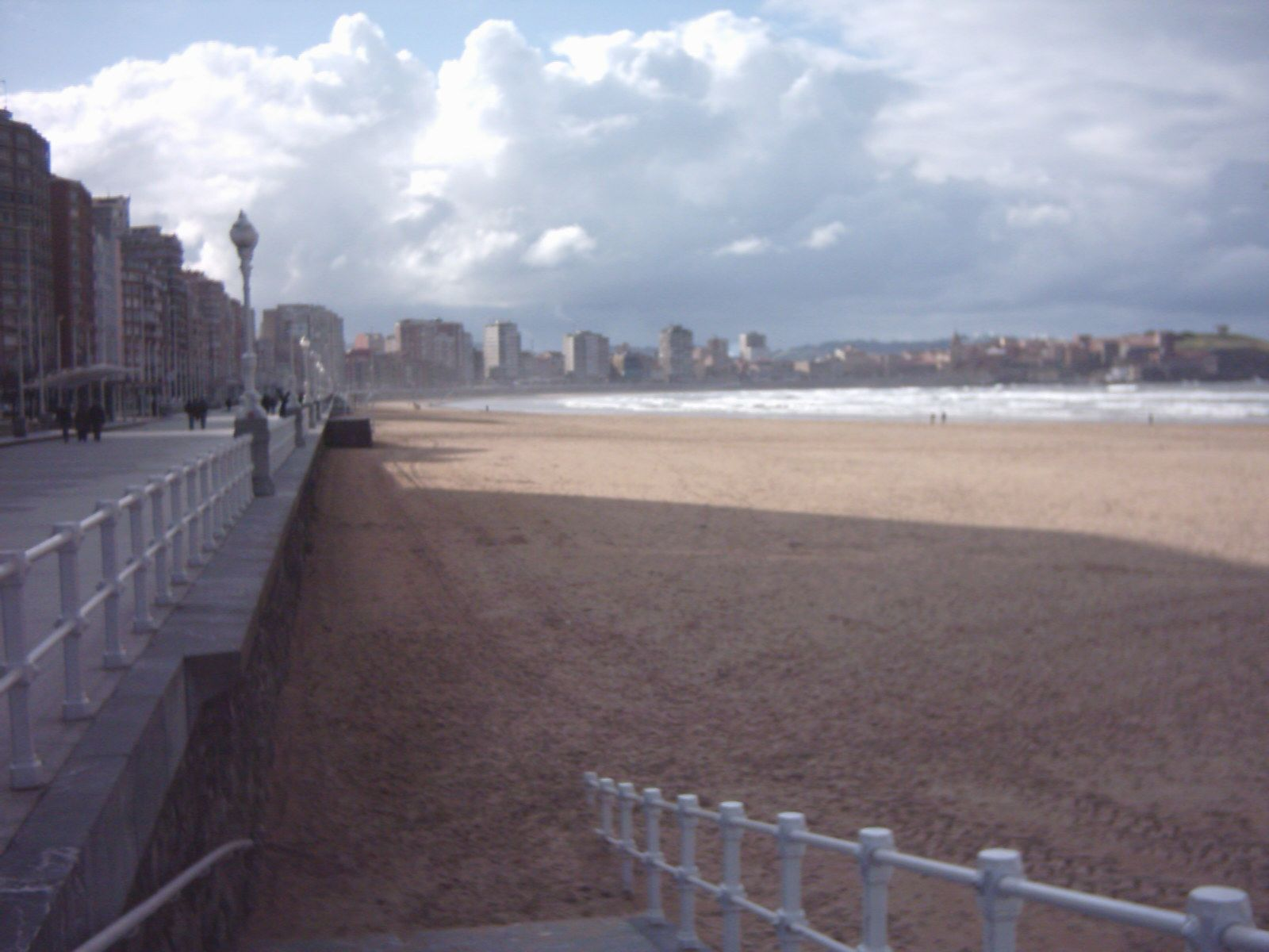 Playa de San Lorenzo en Gijón.